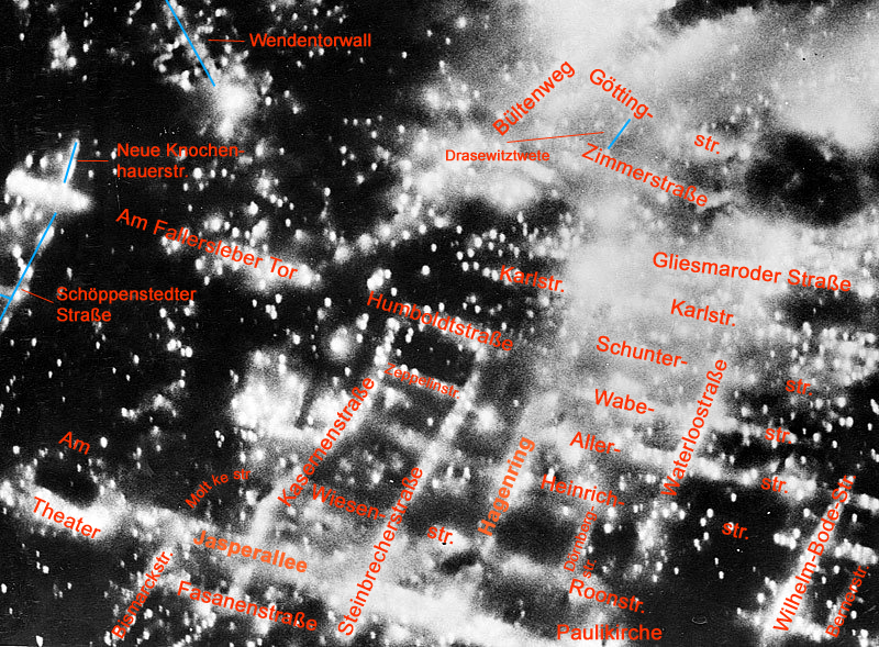 Feuersturm in Braunschweig aufgrund des Bombenangriffs auf Braunschweig am 15. Oktober 1944 – mit nachträglich eingefügten Straßennamen zu besseren Orientierung. Es zeigt den nordwestlichen Bereich des östlichen Ringgebietes. Das Staatstheater (großes dunkles Gebäude mit heller Umrandung auf zwei Seiten) befindet sich in der unteren linken Ecke; davon ausgehend, schräg zur Mitte des unteren Bildrandes verlaufend die heutige Jasperallee (damals Kaiser-Wilhelm-Allee).